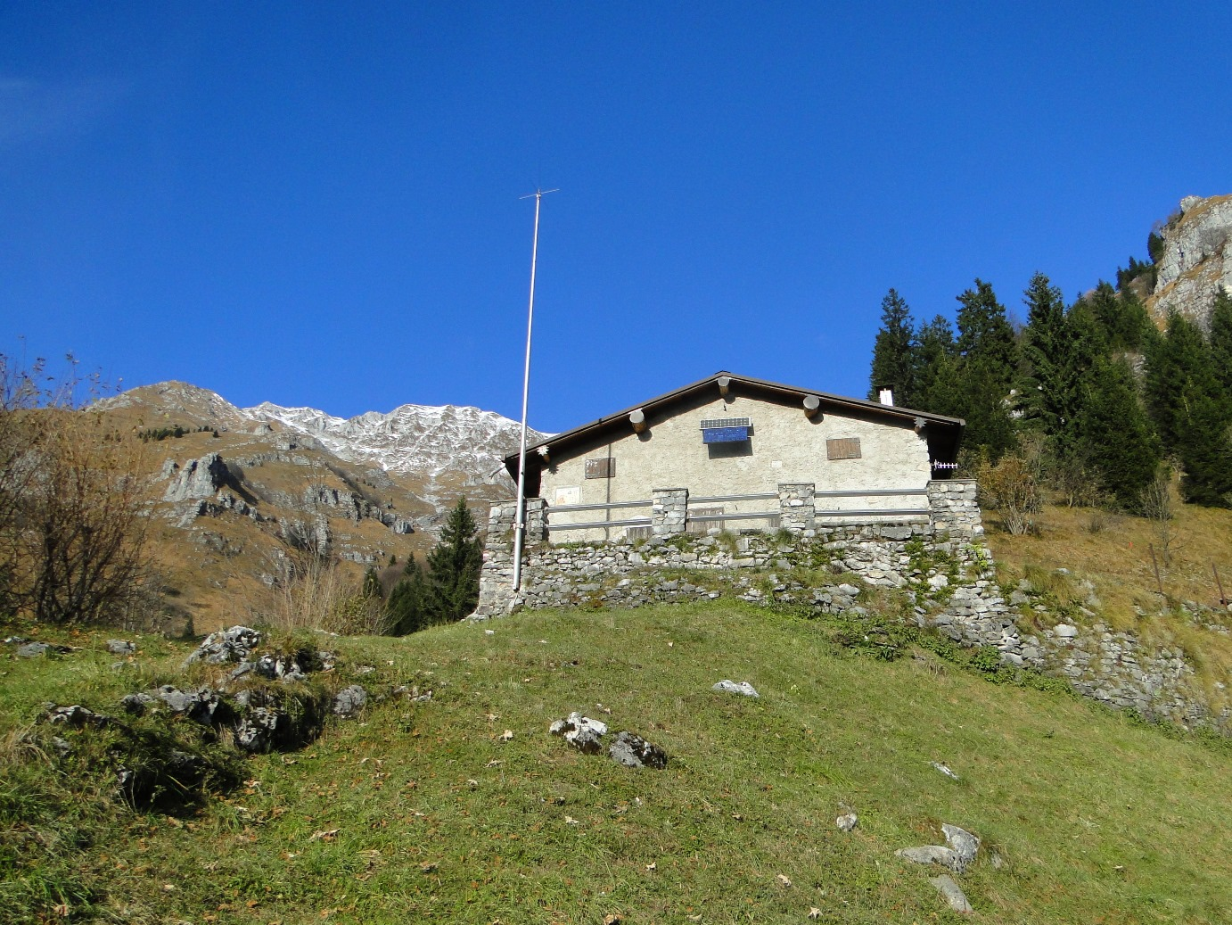 Beita de Sura, val Dossana. Prealpi Bergamasche (BG)